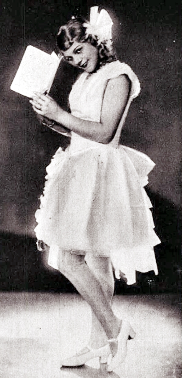 Zilahy Irén, A régi nyár című 1928-as operett szereplője